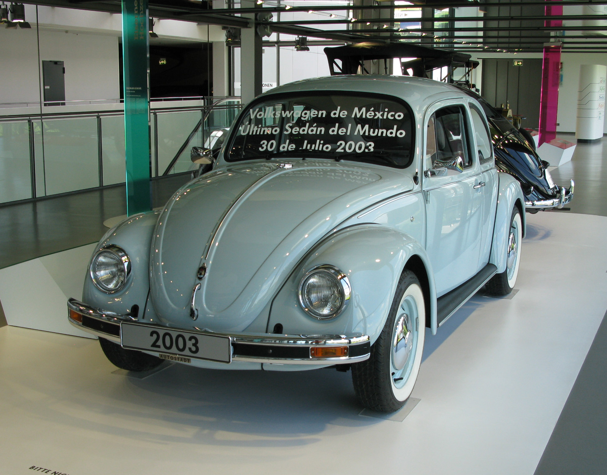 2003 Volkswagen Sedán Última Edición